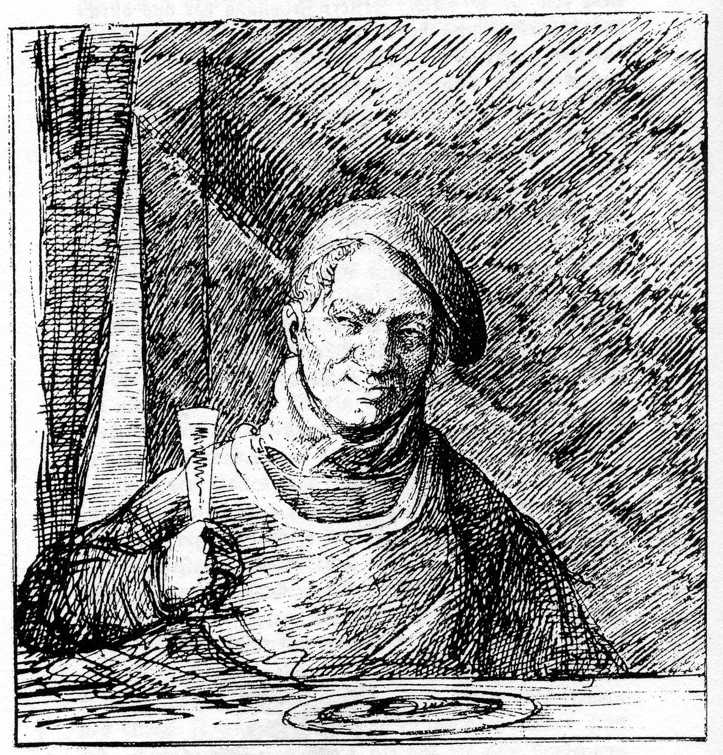 drawing for Geist der Kochkunst